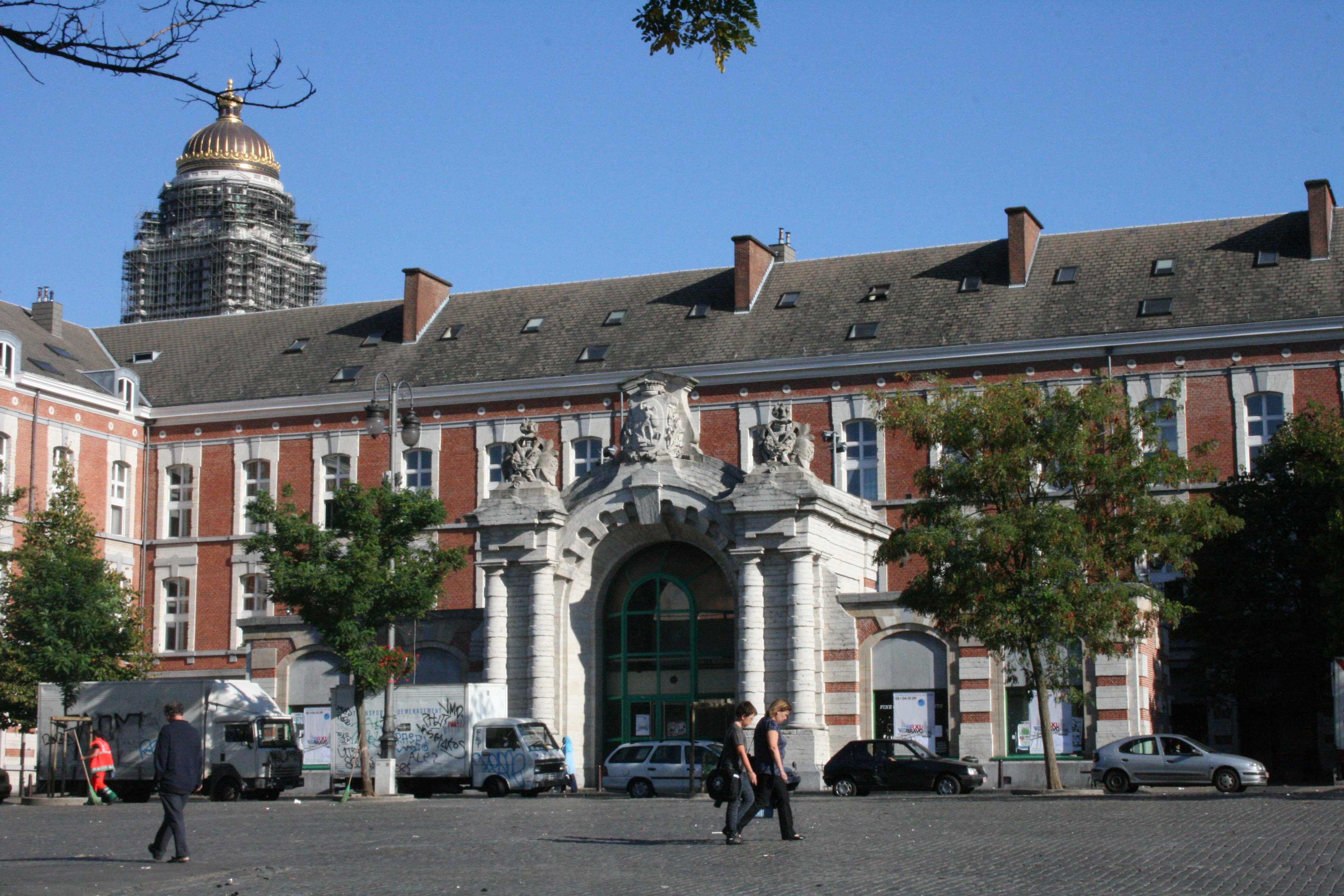 Place du Jeu de balle, Bruxelles, Belgique. Ancienne Caserne des Pompiers (1863). Architecte : Joseph Poelaert